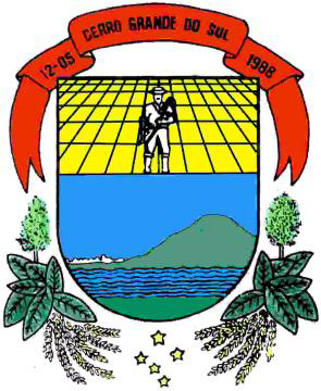 Brasão da cidade de Cerro Grande do Sul, Rio Grande do Sul, Brasil.